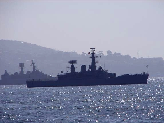 Fragata Zenteno PFG-08